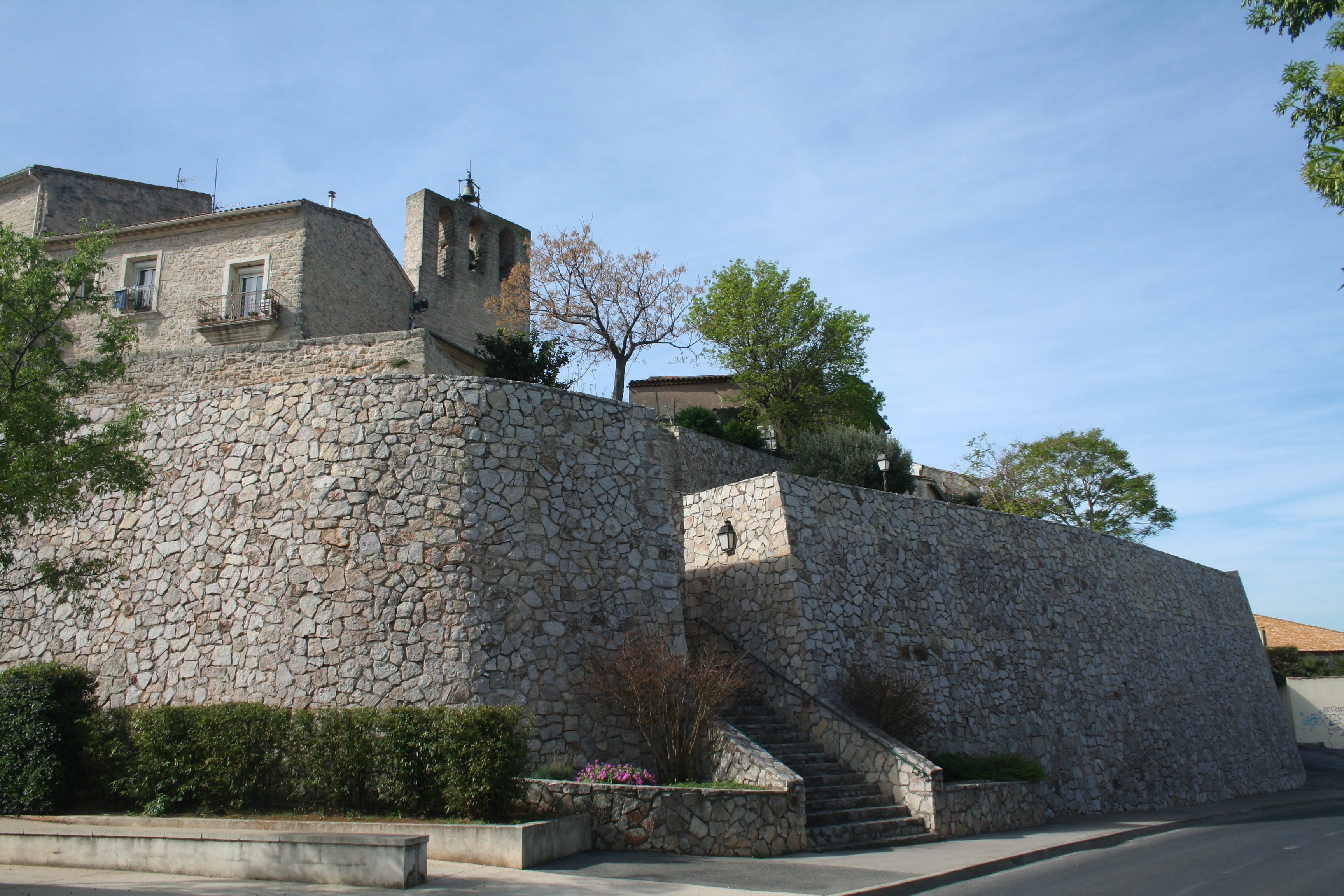 Balaruc-le-Vieux (Hérault), rempart et campanile de l'église Saint-Maurice